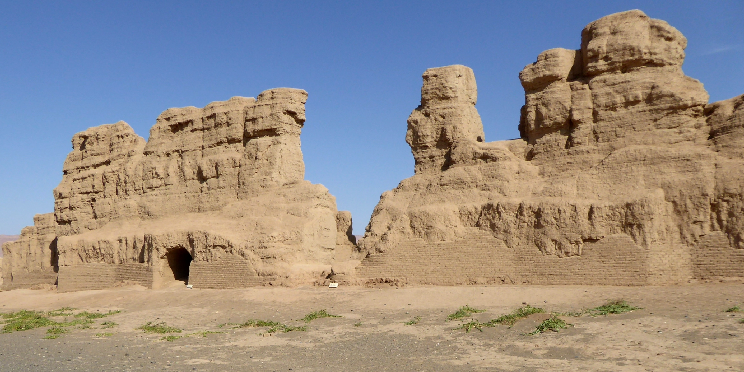 Gaochang Ruins Turpan Xinjiang China 新疆 吐魯番 高昌故城